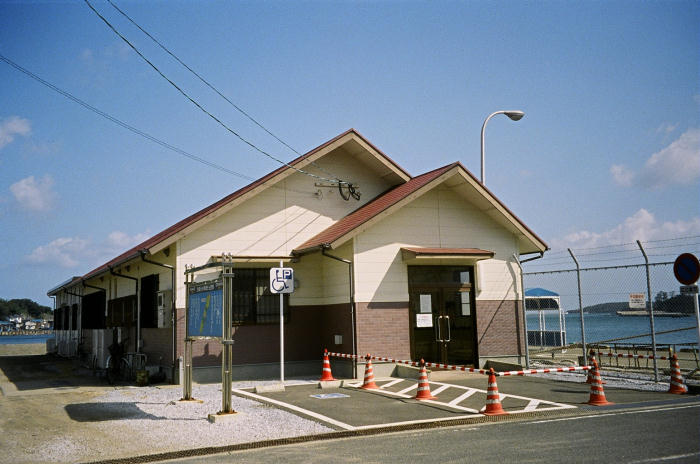 対馬市上対馬町比田勝、比田勝港国際ターミナル。